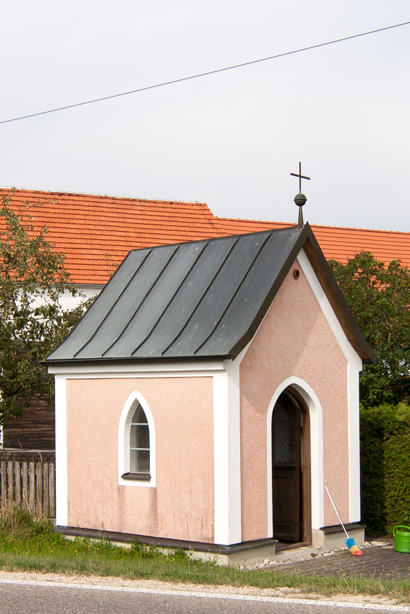 Kleine Klausenkapelle; 1866 erbaut.This is a photograph of an architectural monument.